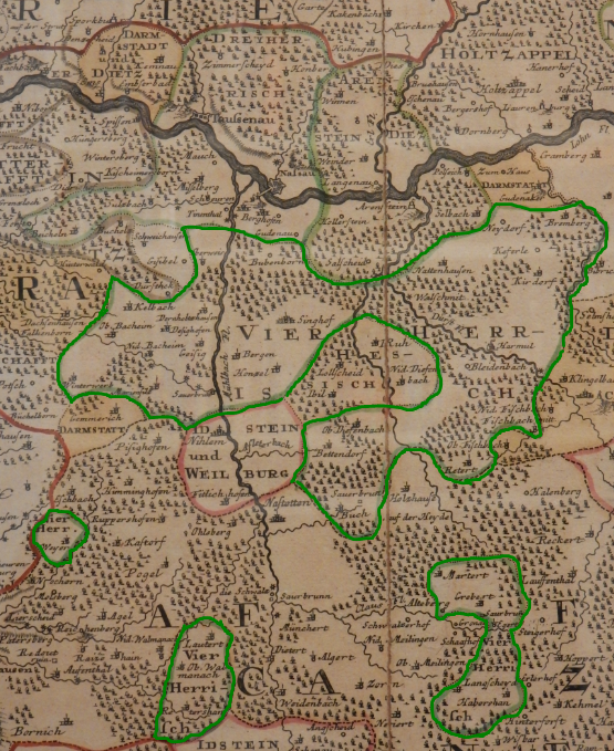 Eine Karte mit dem Gebiet des Vierherrischen mit dem Gebietsstand von 1745 (im Jahre der Auflösung), die Grenzen sind grün markiert